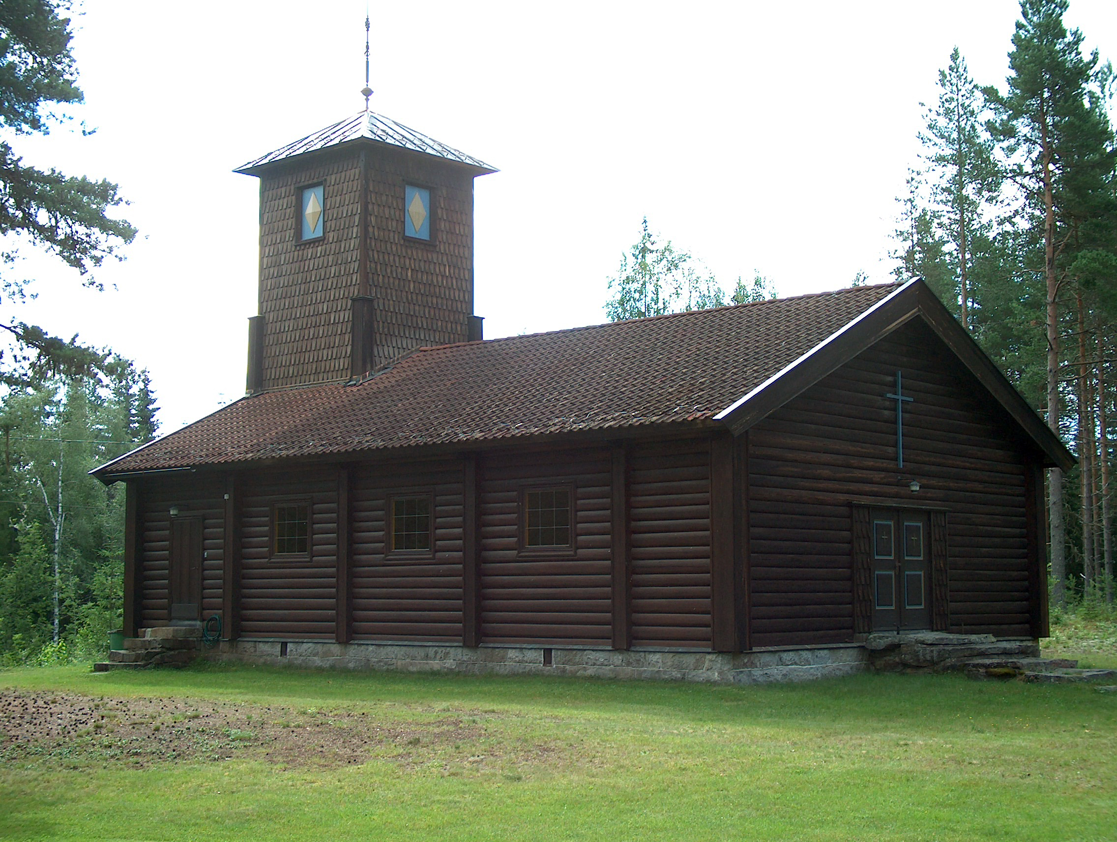 Strømsoddbygda kapell